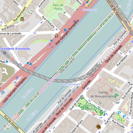 Կարապի կղզու քարտեզ